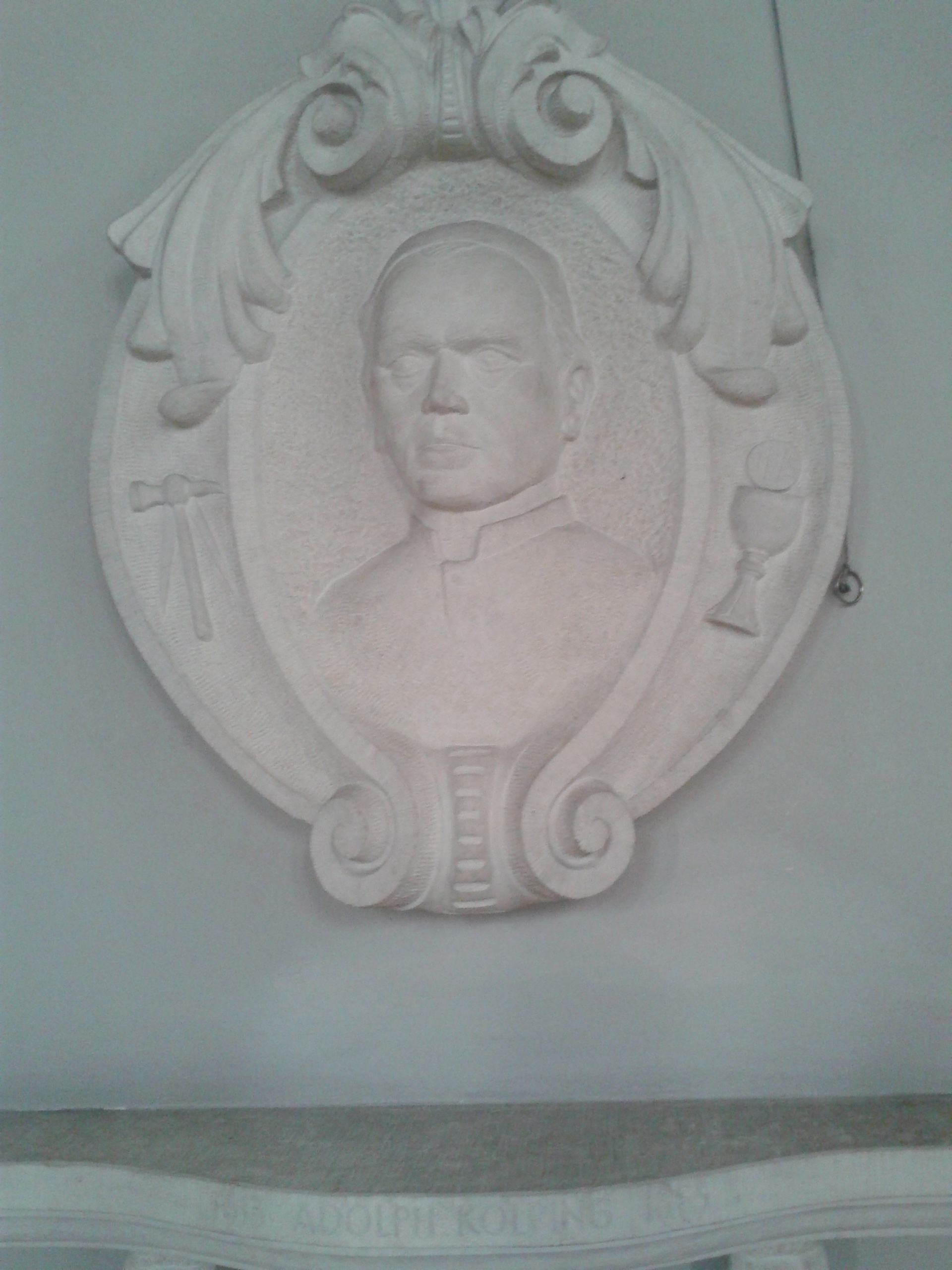 Büste Adolf Kolpings in der Stadtpfarrkirche St. Josef (Reinhausen)